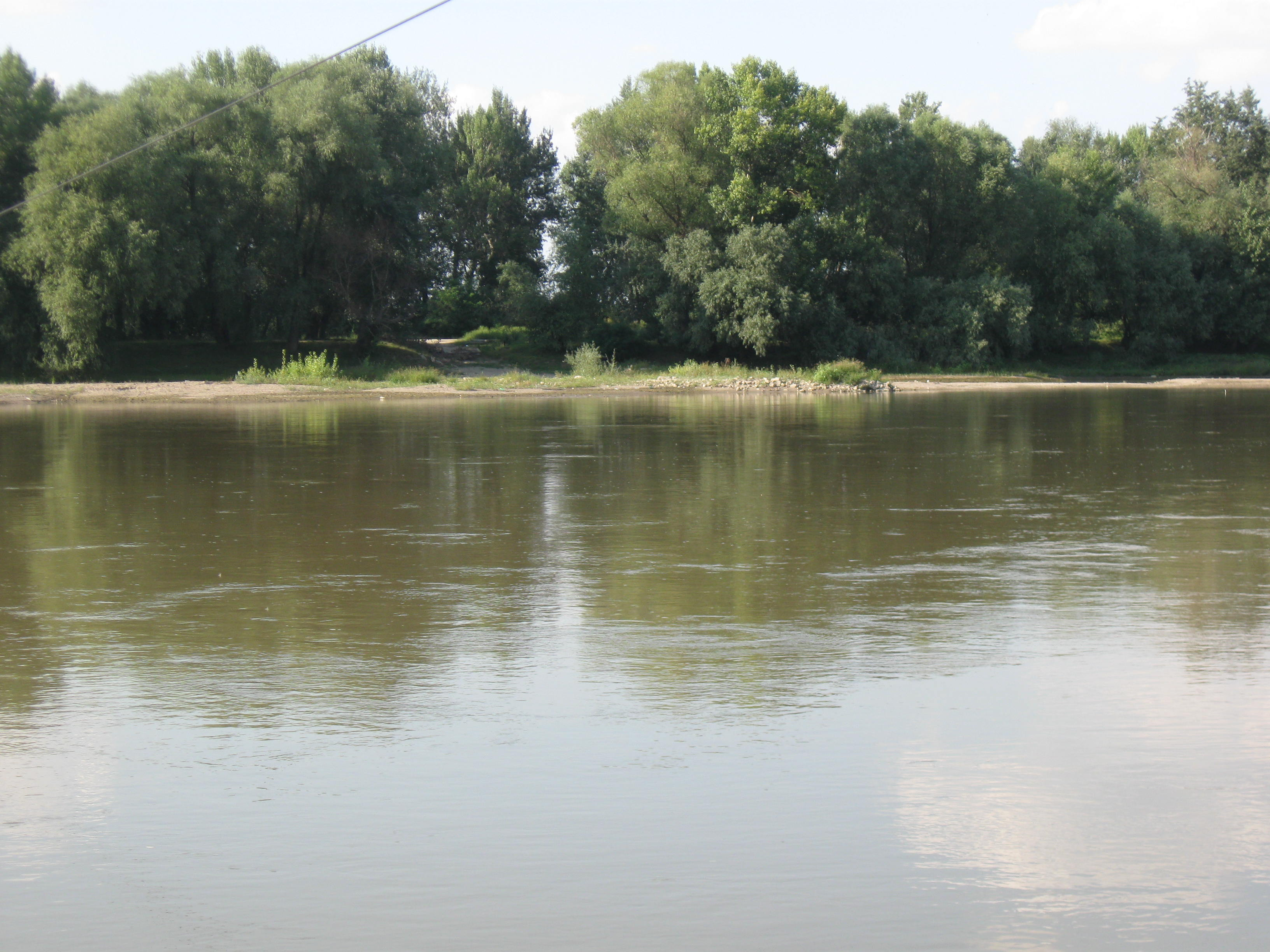 A Maros alsó szakaszának részlete Pécskán (Arad megye, Románia)